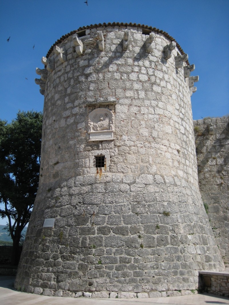 Frankopanski kastel, Krk, Croatia